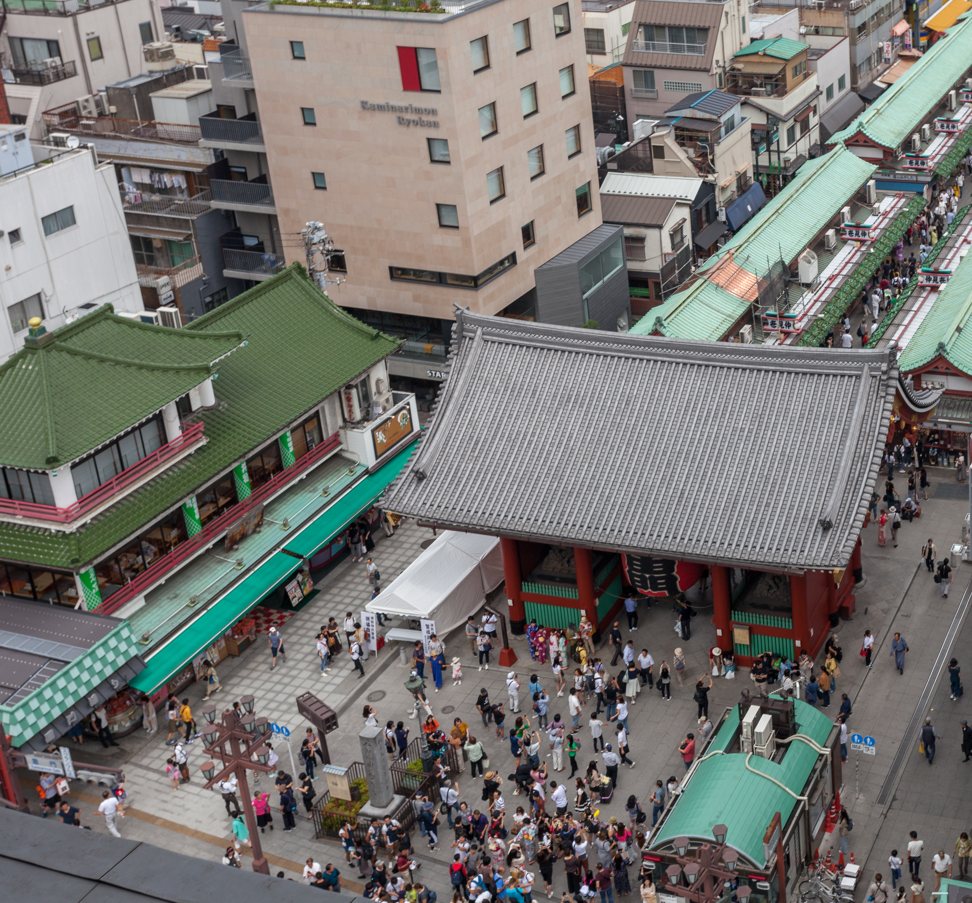 Kaminari-mon